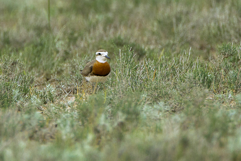 Caspian Plover - Kazakistan_S4E1655